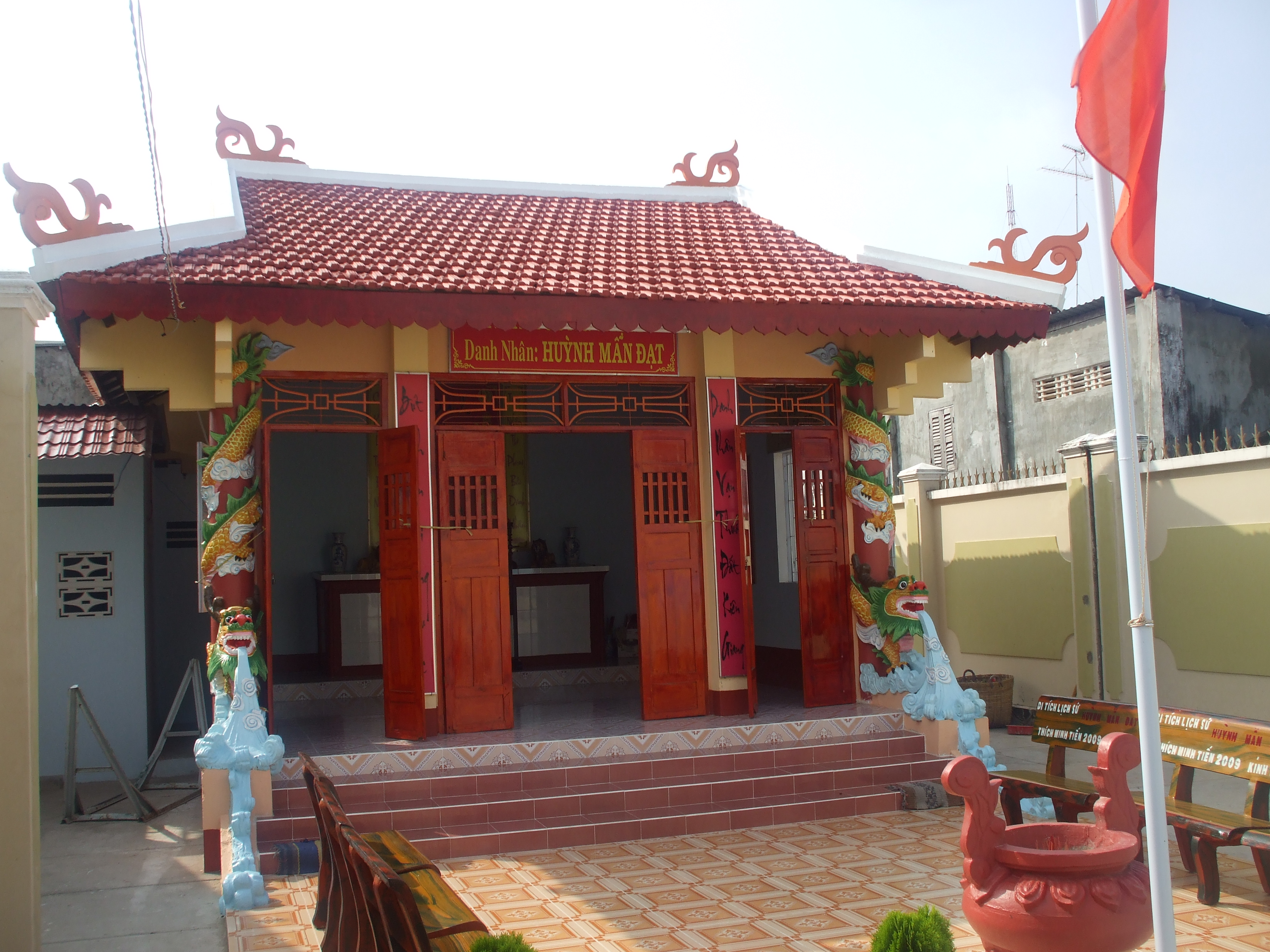 Đền Thờ Huỳnh Mẫn Đạt tại nơi chôn cất ông (Tp. Rạch Giá, Kiên Giang, Việt Nam)